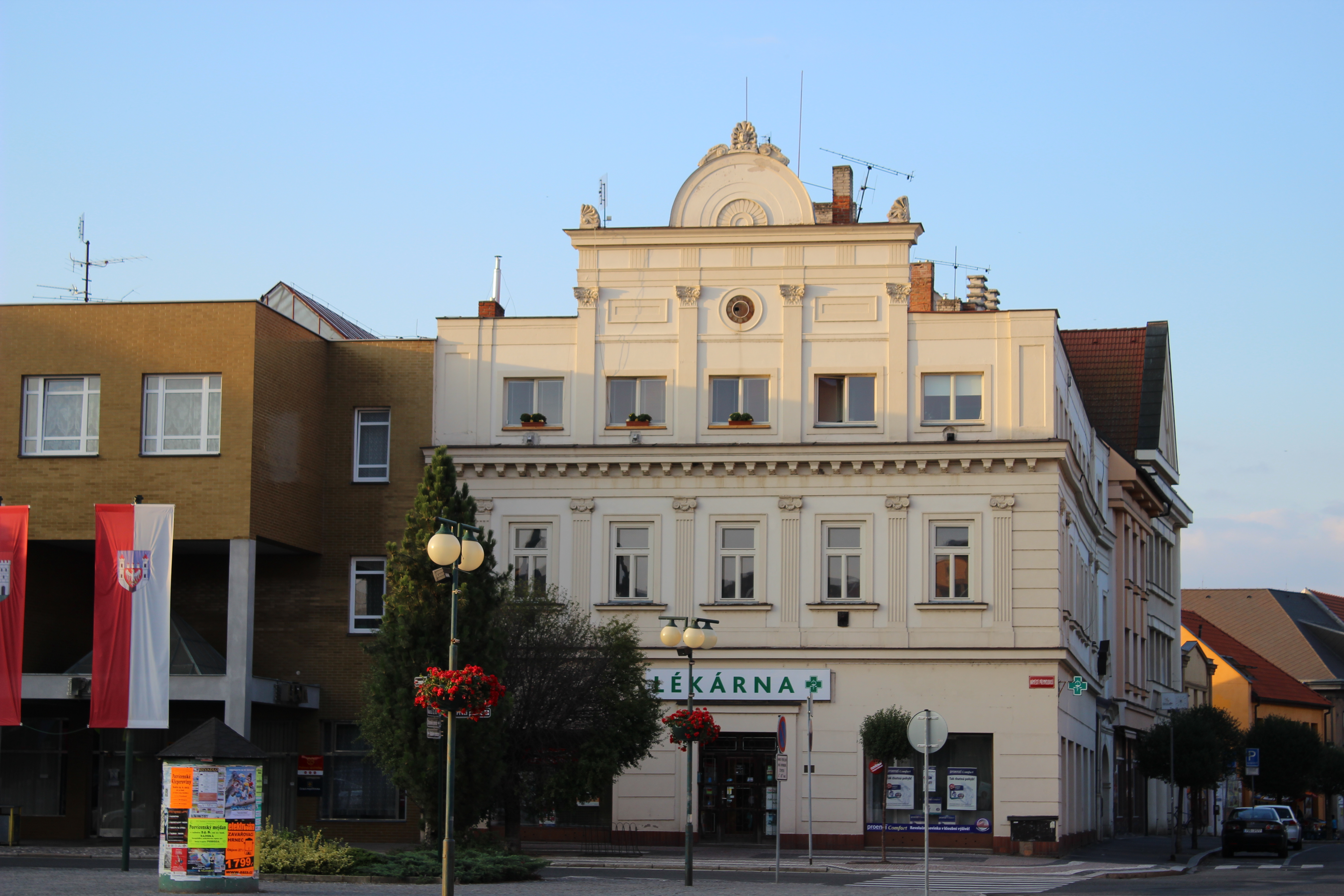 Jižní průčelí objektu na nároží náměstí Přemyslovců (vlevo) a Palackého třídě (vpravo) v Nymburce.